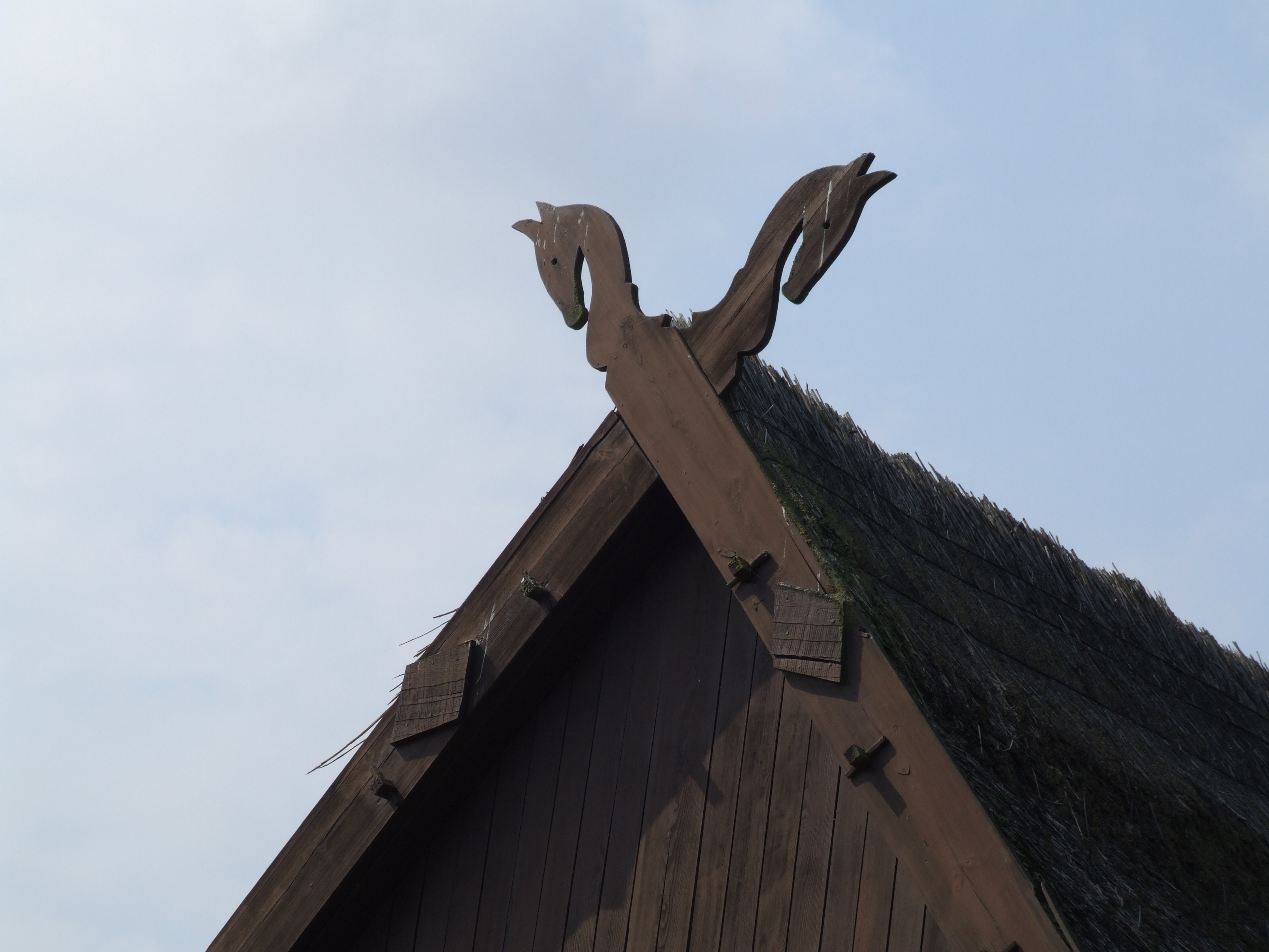 gekreuzte Pferdeköpfe am Giebel, traditioneller Dachschmuck in Mecklenburg-Vorpommern, Deutschland